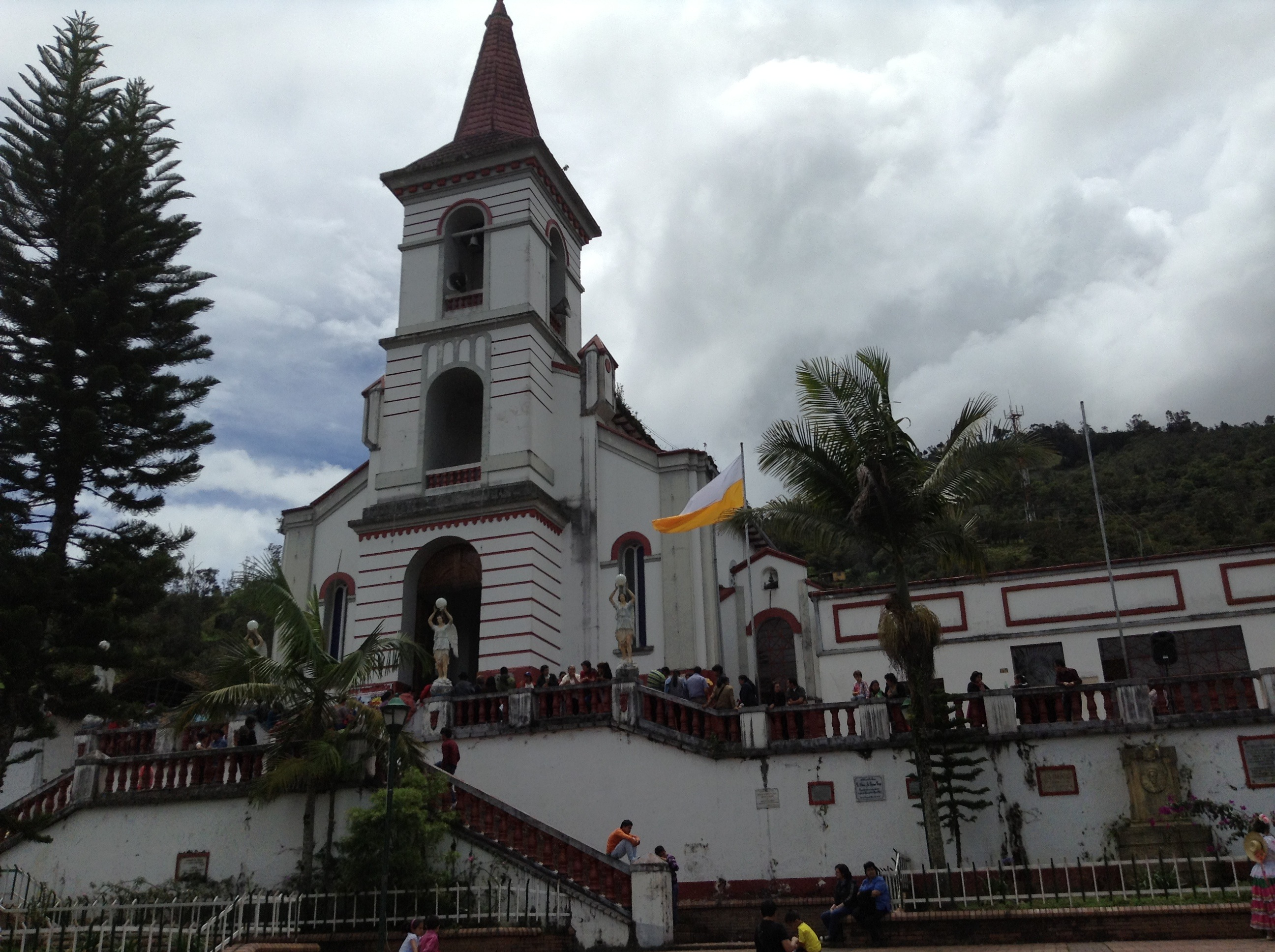 ubala cundinamarca